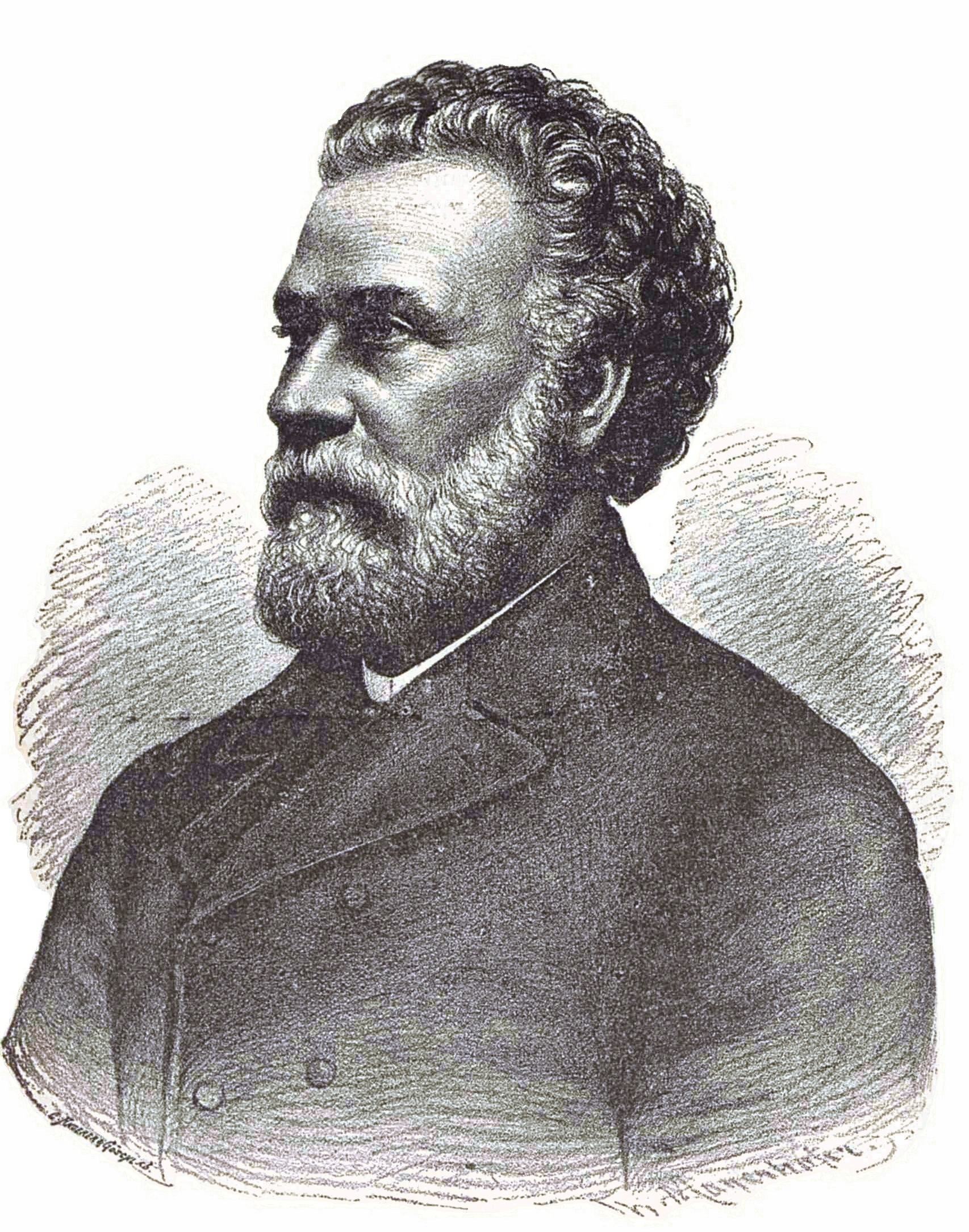 Ion.C.Bratianu